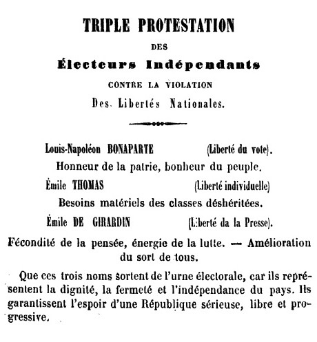 Affiche d'Émile Thomas pour les élections complémentaires de septembre 1848 (Les Affiches rouges, reproduction exacte et histoire critique de toutes les affiches ultra-républicaines placardées sur les murs de Paris depuis le 24 février 1848, Paris, Giraud et Dagneau, 1851, p. 273).